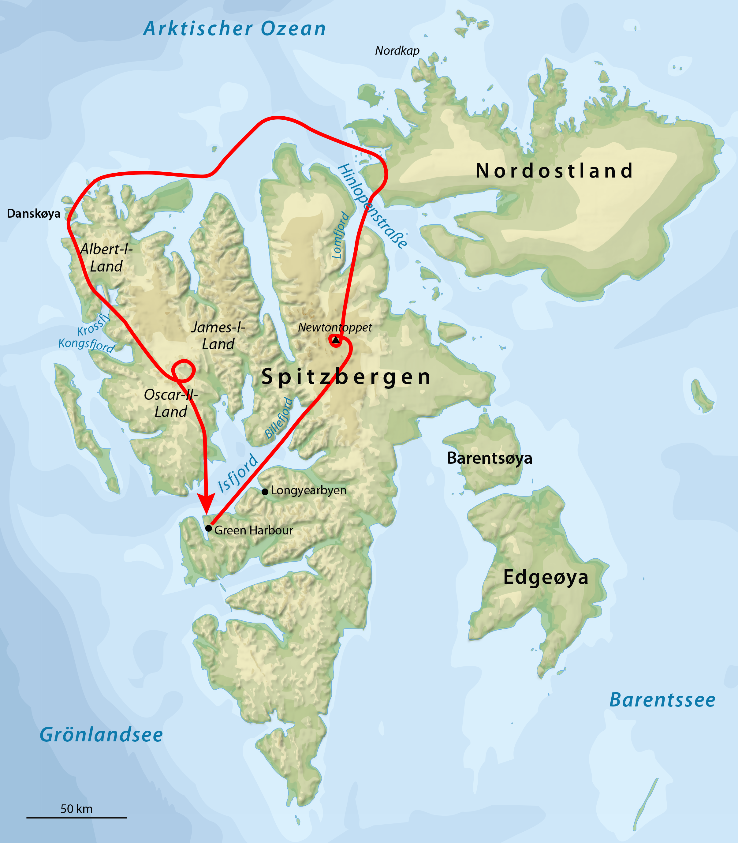 Flugroute der Junkers-Spitzbergen-Expedition am 8. Juli 1923